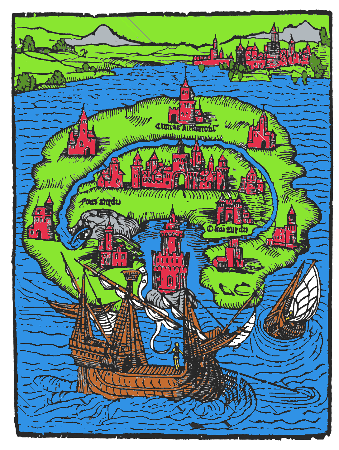 Titelholzschnitt aus Thomas Morus' Roman Utopia